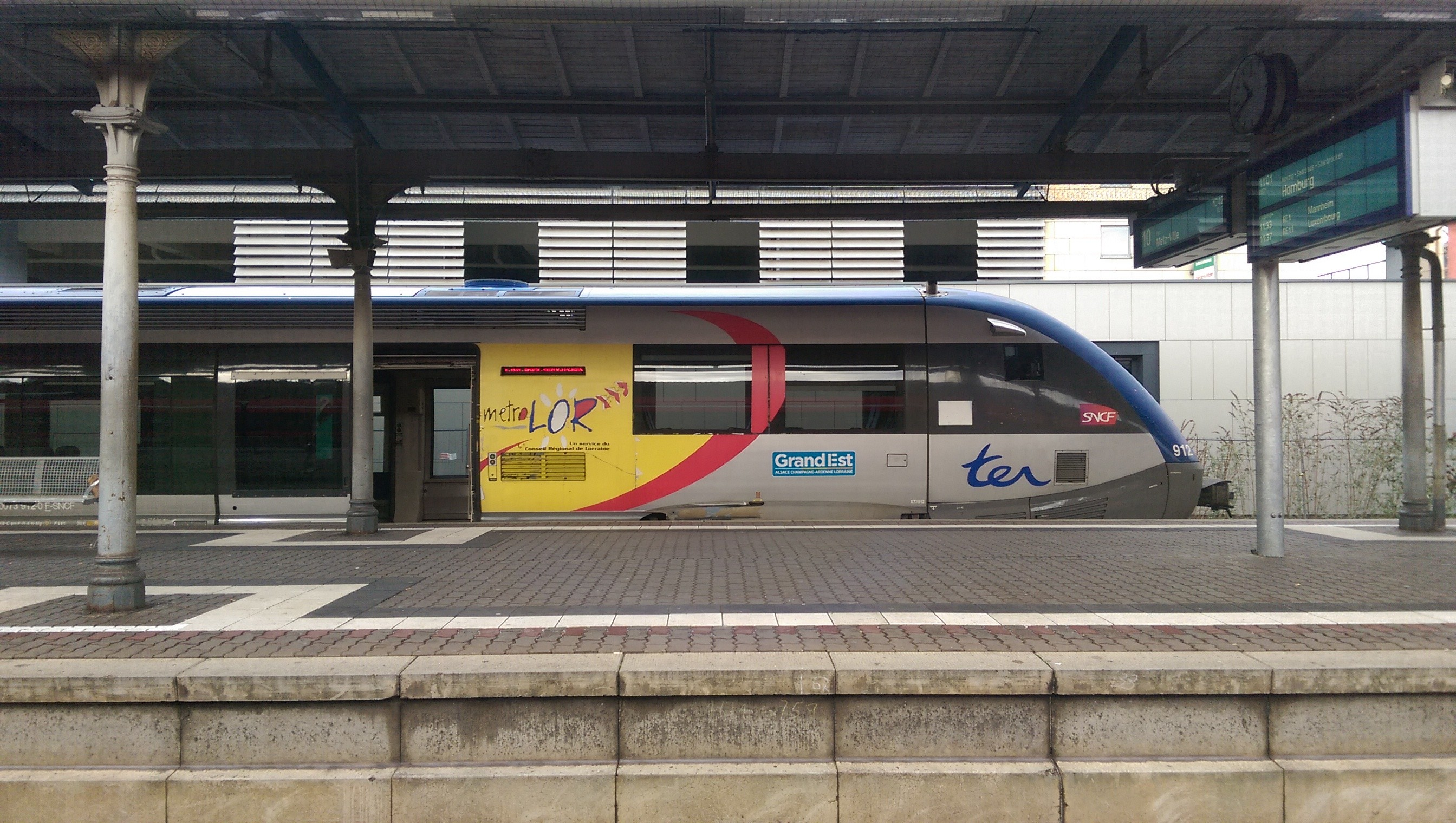 L'autorail X 73912 de la SNCF, en livrée Métrolor, attend le départ de la gare centrale de Trèves (Trier Hbf) en Allemagne, pour retourner à Metz en empruntant la ligne de la Haute-Moselle (Obermoselstrecke) et puis la ligne vers Thionville.